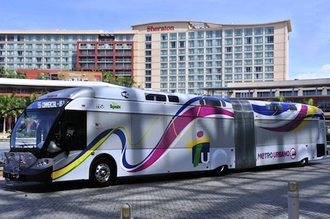 Preparaciones